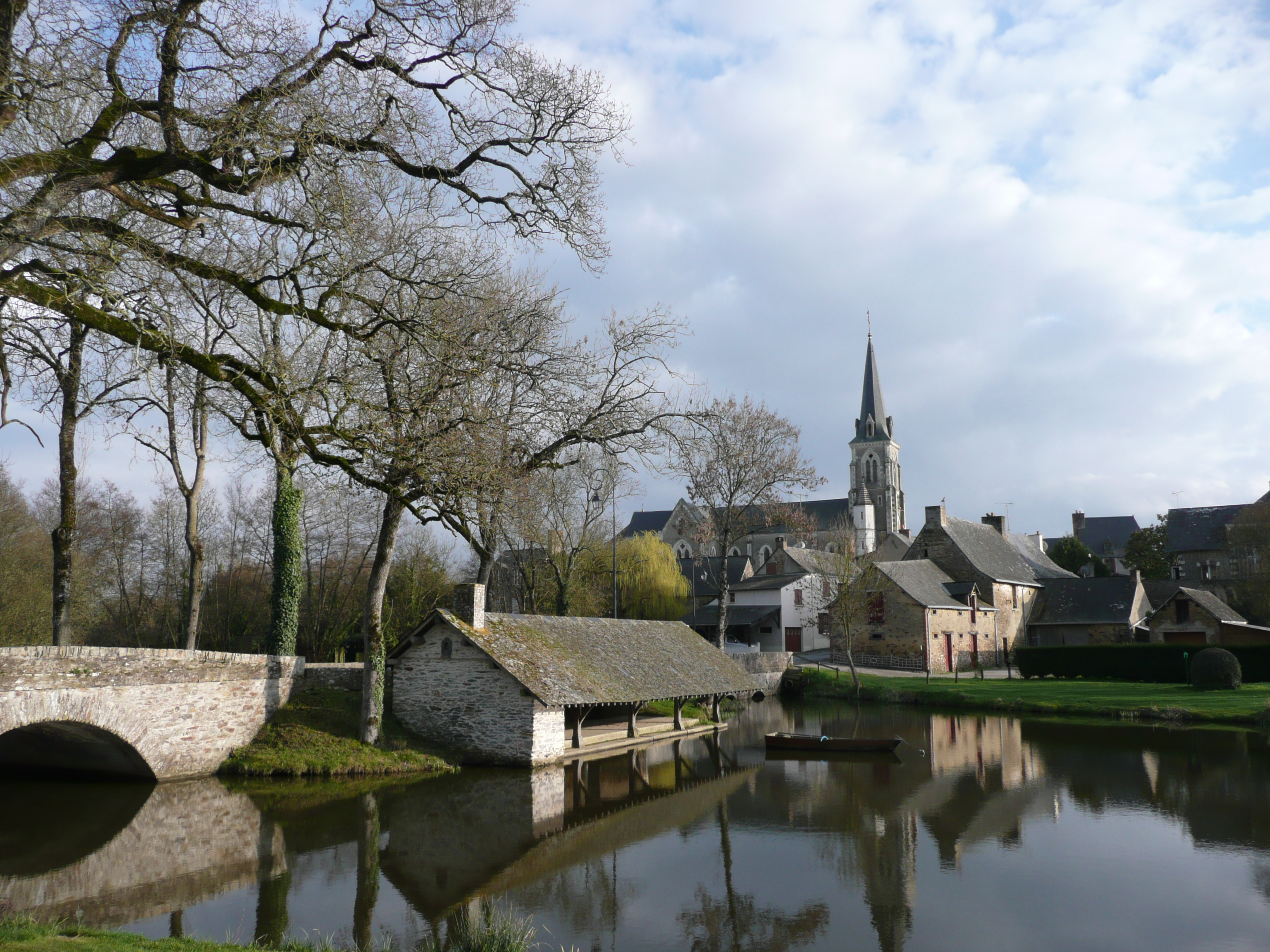 Vue du bourg d'Armaillé